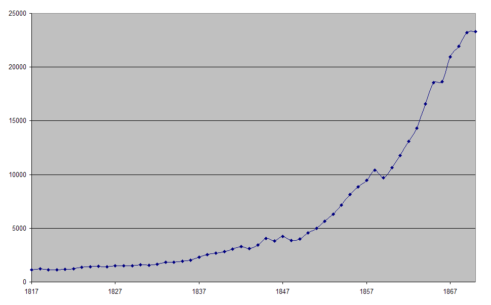 Steinkohleförderung in Preußen 1817-1870 (in 1000 t) (Zahlen nach sozialgeschichtliches Arbeitsbuch 1, S.63f.)